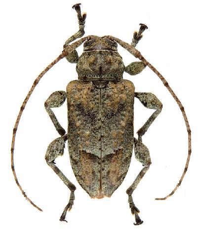 Leptostylopsis annulipes